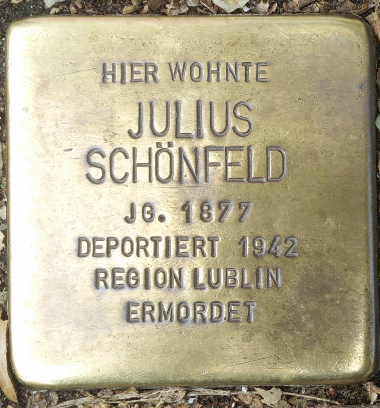 Bad Vilbel, Stolperstein Julius Schönfeld